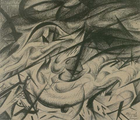 Fire in Kiev